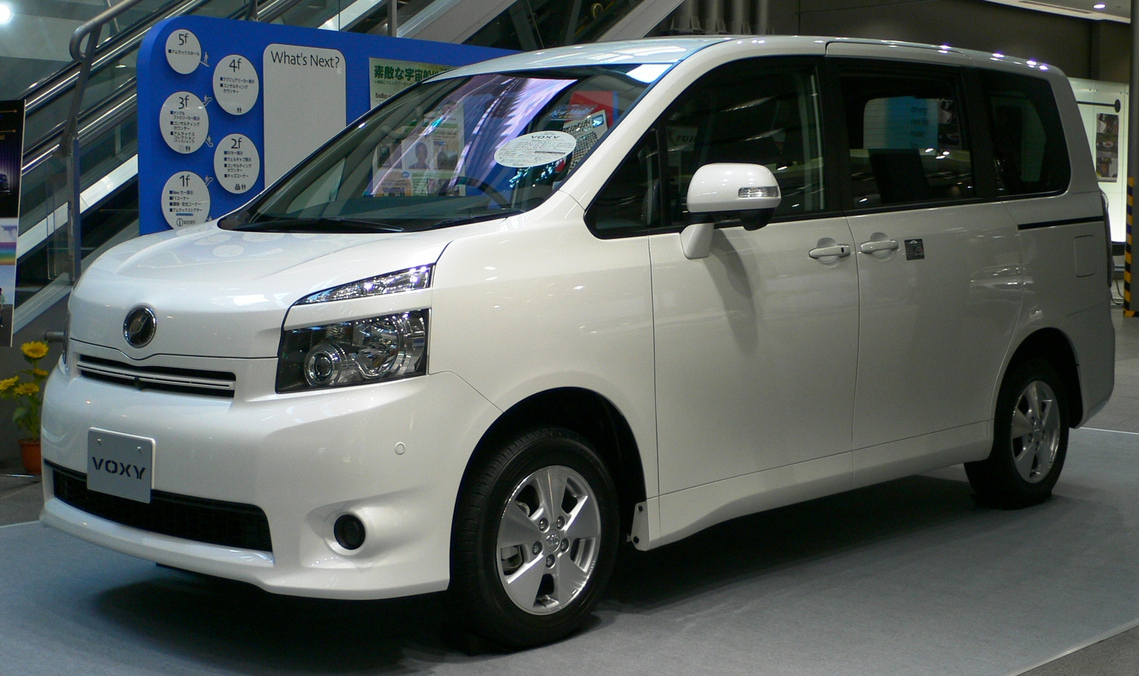 2nd Toyota Voxy (トヨタ・ヴォクシー) photographed in AMLUX (アムラックス)